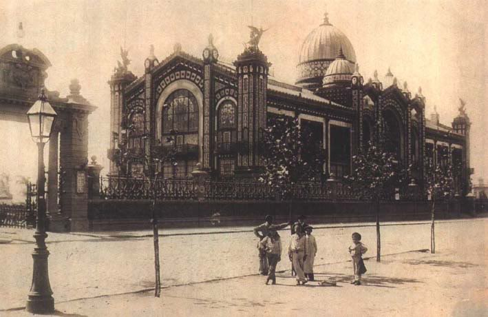 The Argentine Pavillion for the Exposition Universelle of Paris of 1899, when it operated as the National Museum of Arts. In 1933 it was finally dismantled and the pieces of arts were moved to a new building.